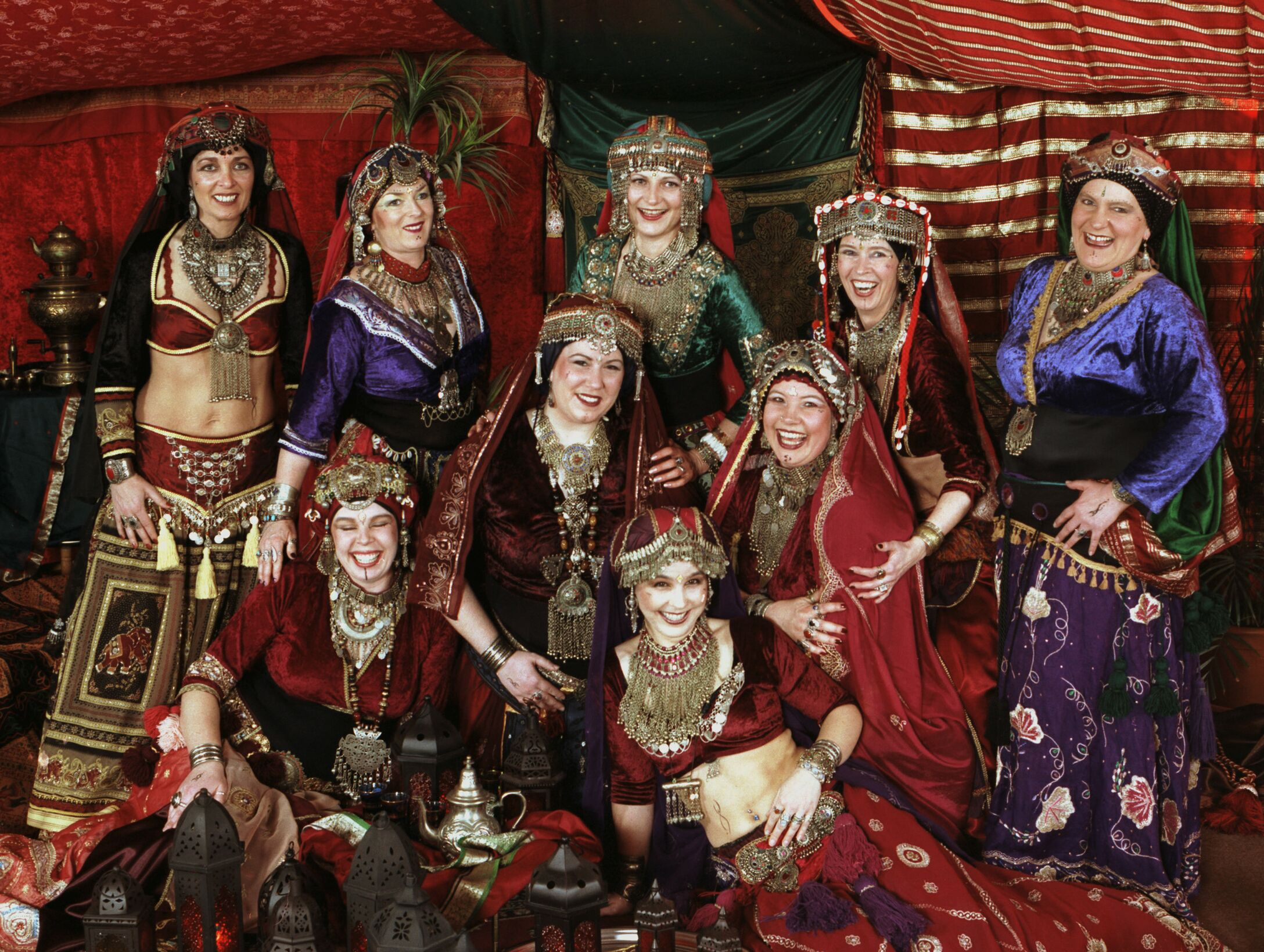 Bildbeschreibung: Tribal Style Dance Gruppe NEA'S Tribal aus Dillenburg Fotograf/Zeichner: HelenaL Datum: 2003 andere Versionen: keine